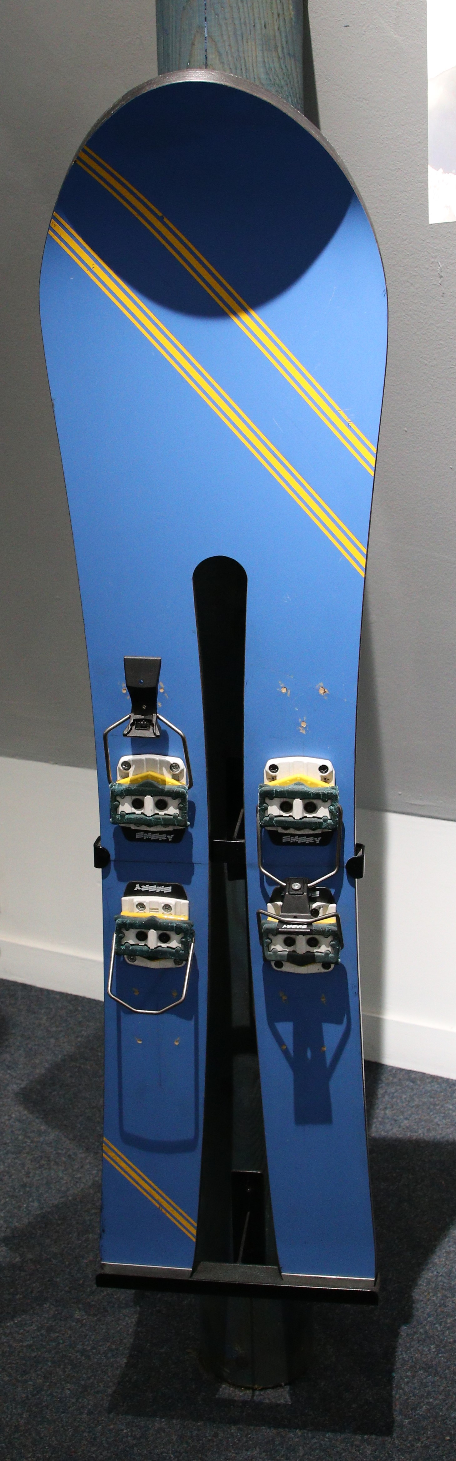 Monoski, matières composites, fixation Emery, début des années 1990, Collection Musée dauphinois. Ce modèle a été rapidement retiré du marché car peu apprécié par le public. Exposition de longue durée "Le rêve blanc. L'épopée des sports d'hiver dans les Alpes" au Musée dauphinois, Grenoble